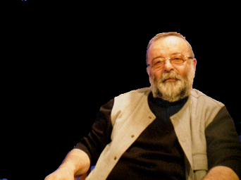 Portrait d'Claude Rutault.